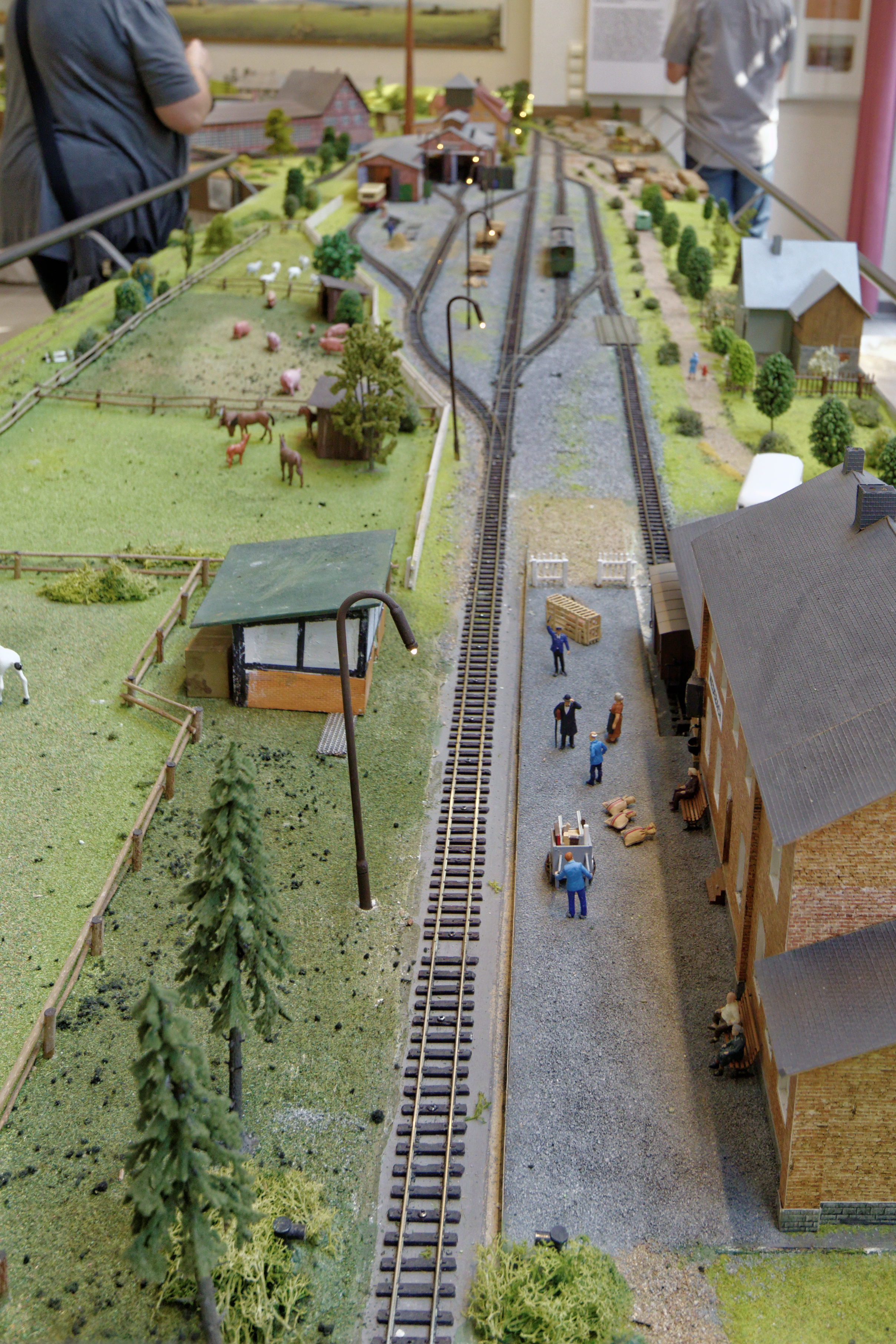 Medebach Städt. Museum; Innenansicht